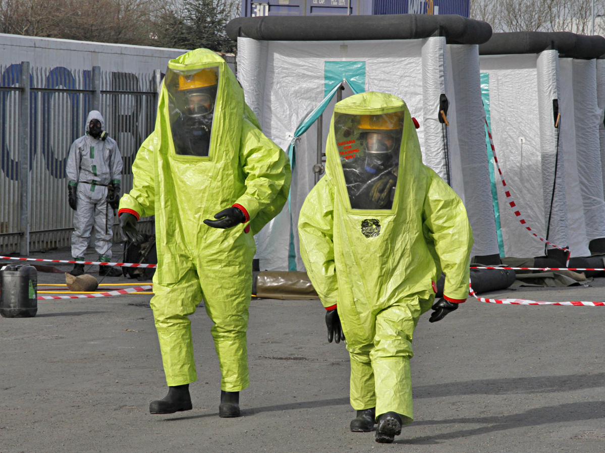 EOD Exercise Dublin Port